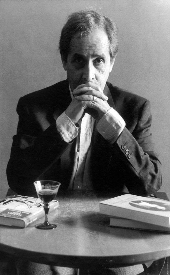 Jorge Eduardo Eielson / Fotografía de María Mulas.